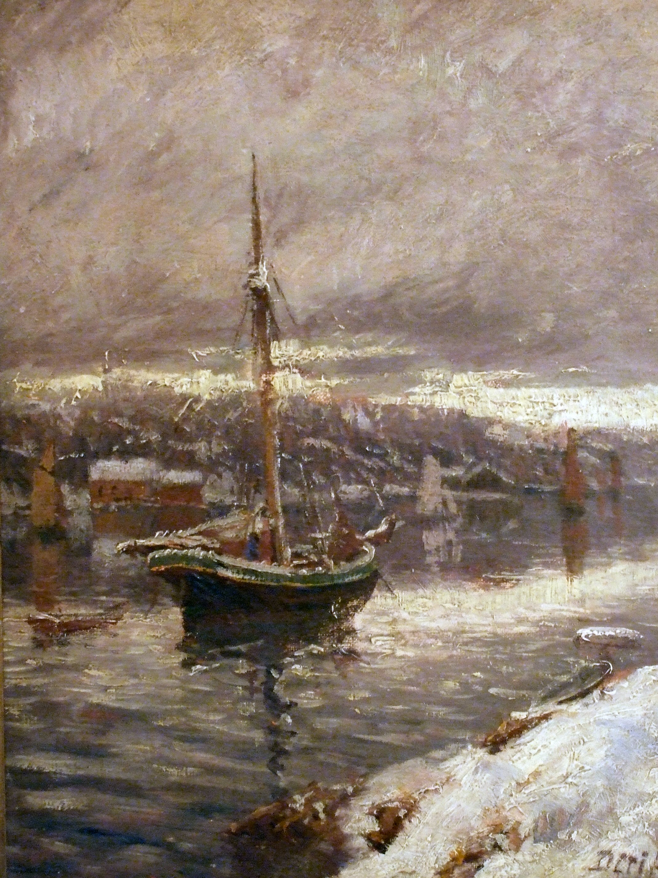 painting